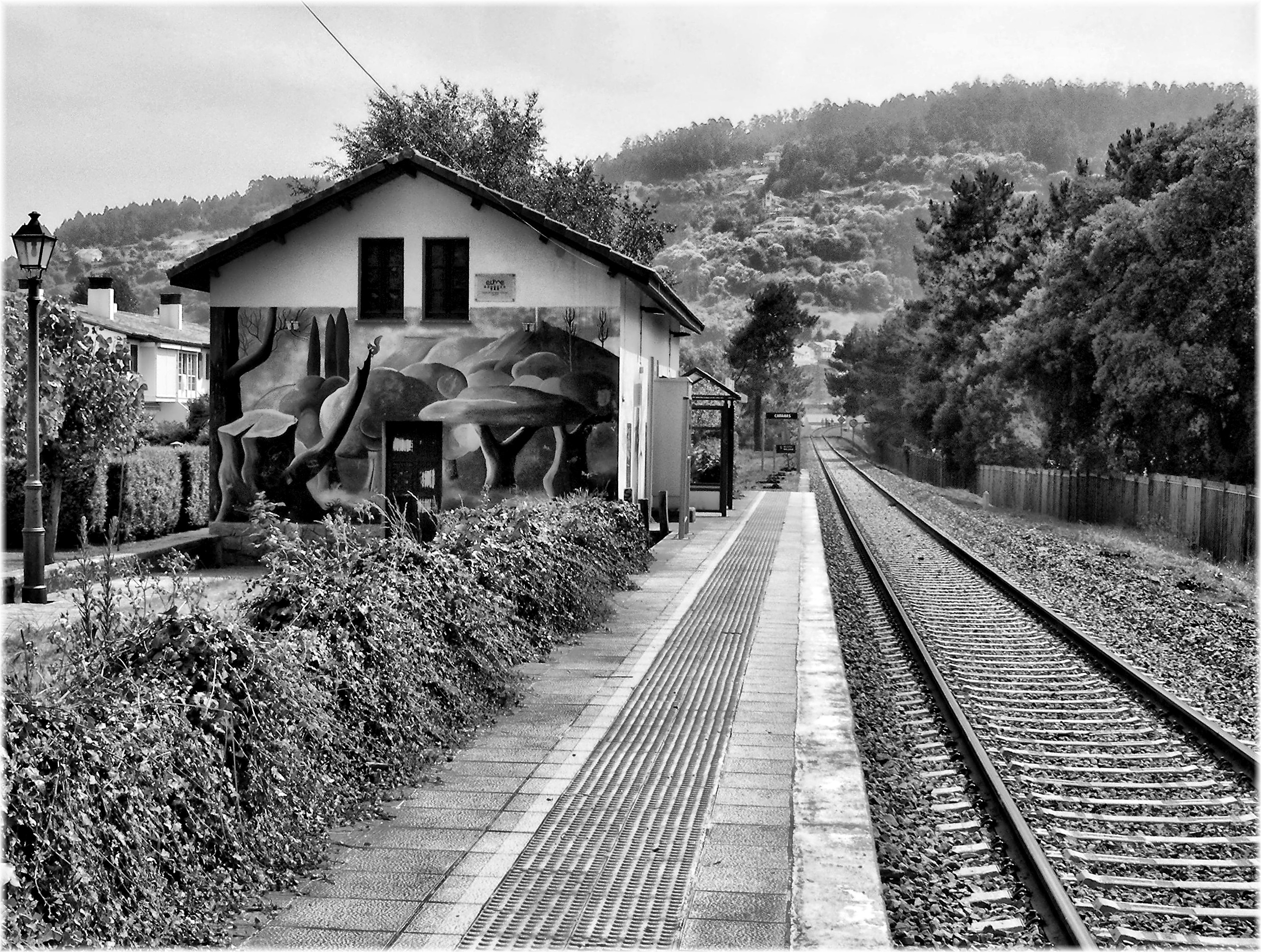 Estación de Cabanas - Areal.